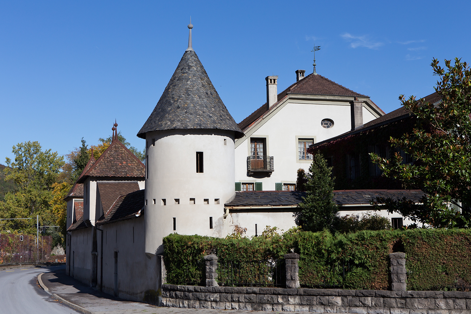 Maison Dufey à Monthey (VS)